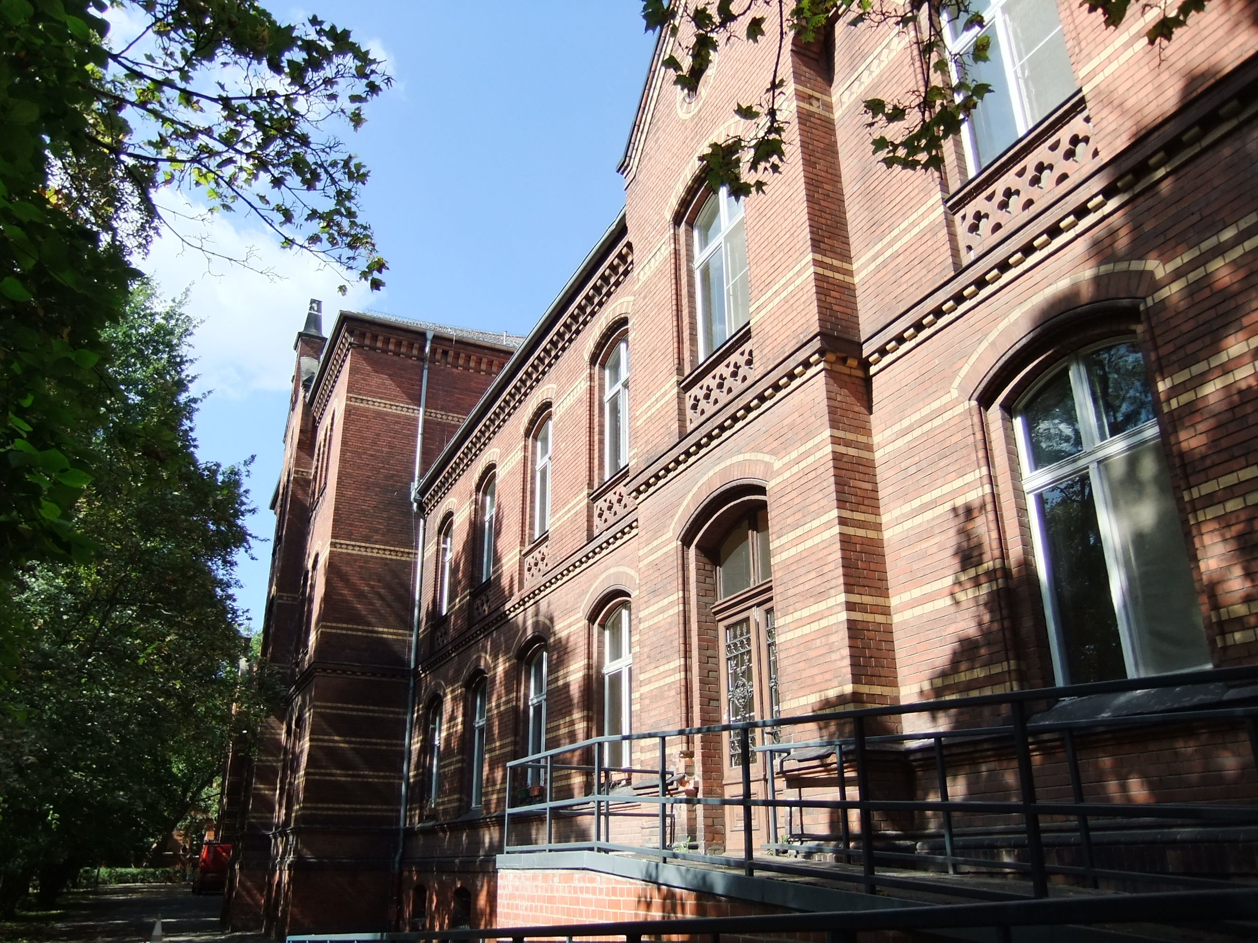 Denkmalliste Berlin OBJ-Dok-Nr.: 09040301 - Berlin Lichtenberg, Herzbergstraße 79 Haus 2, ehem. Städtische Irrenanstalt Herzberge, 1889-1893 von Hermann Blankenstein (Denkmalbereiche, Gesamtanlagen)